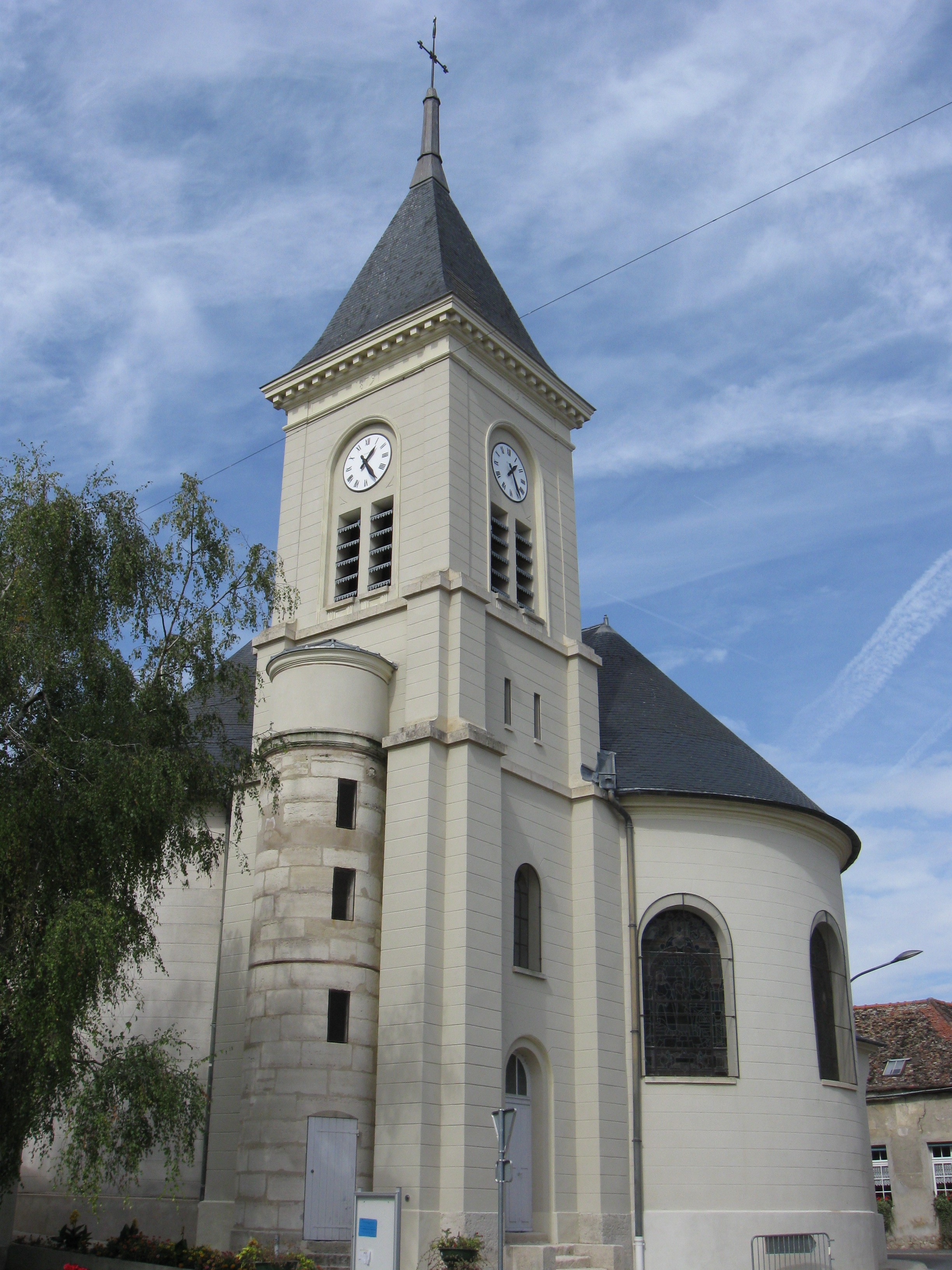 Église Saint-Léger de Charny. (Seine-et-Marne, région Île-de-France).